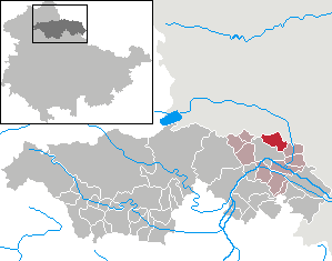 Voigtstedt in Thuringia - Kyffhäuserkreis